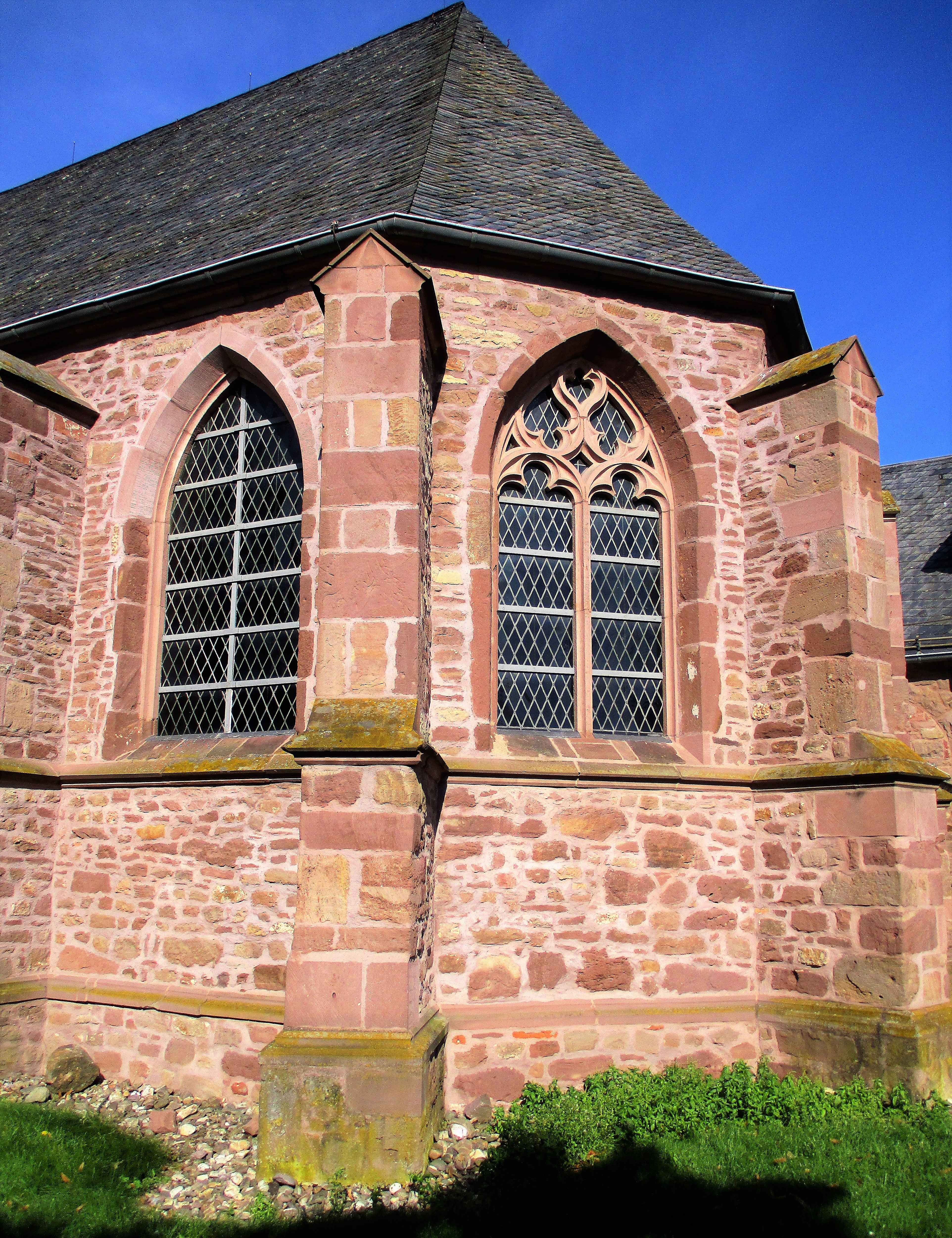 Alte Pfarrkirche Kreuzau - Stockheim, Denkmal - Nr. 42